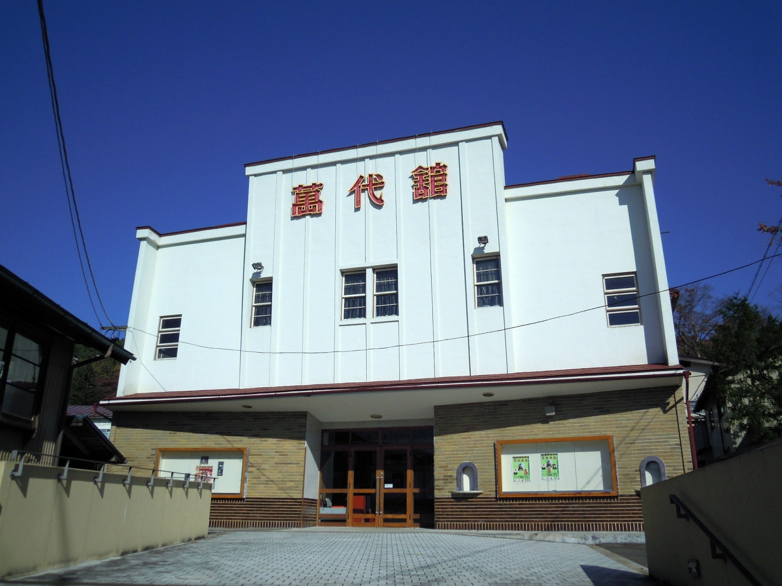 岩手県二戸郡一戸町にある萬代舘